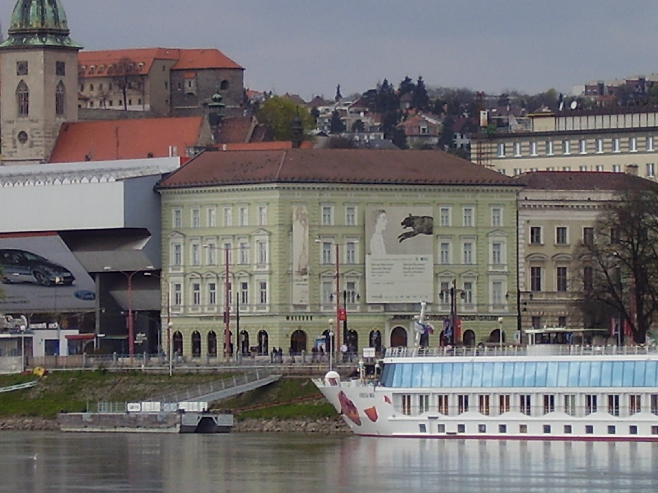 Bratislava riverfront